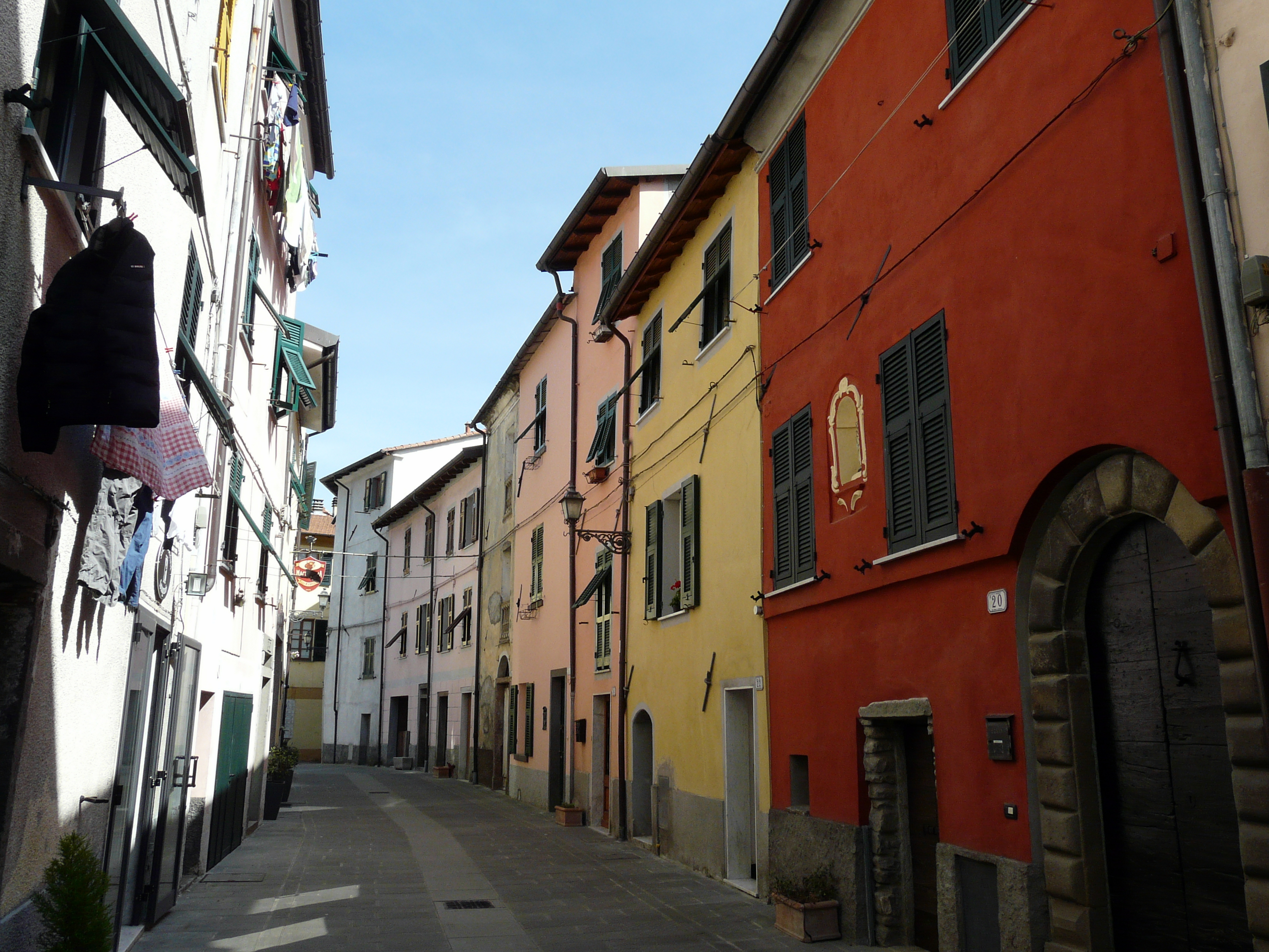 Via Borgo San Bernardo, Brugnato, Liguria, Italia